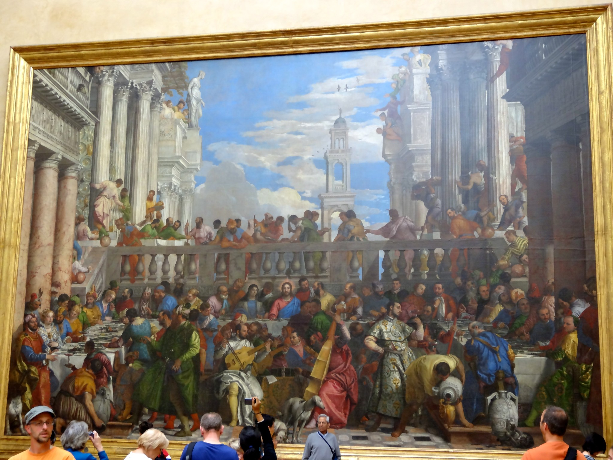 Paul Véronèse: Les Noces de Cana, 1528, Musée du Louvre, Ier arrondissement, Paris, France.